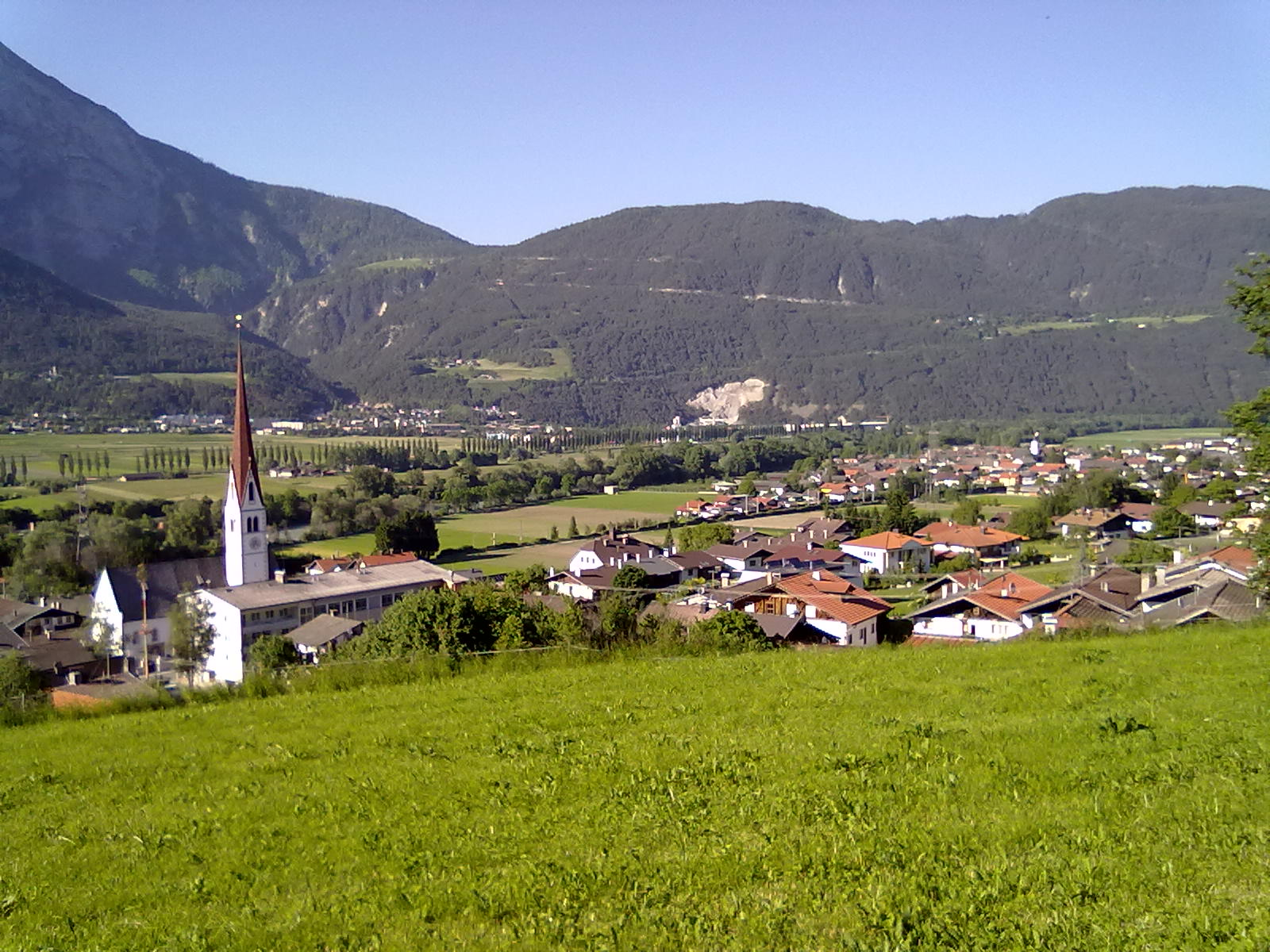 Pfaffenhofen von Norden